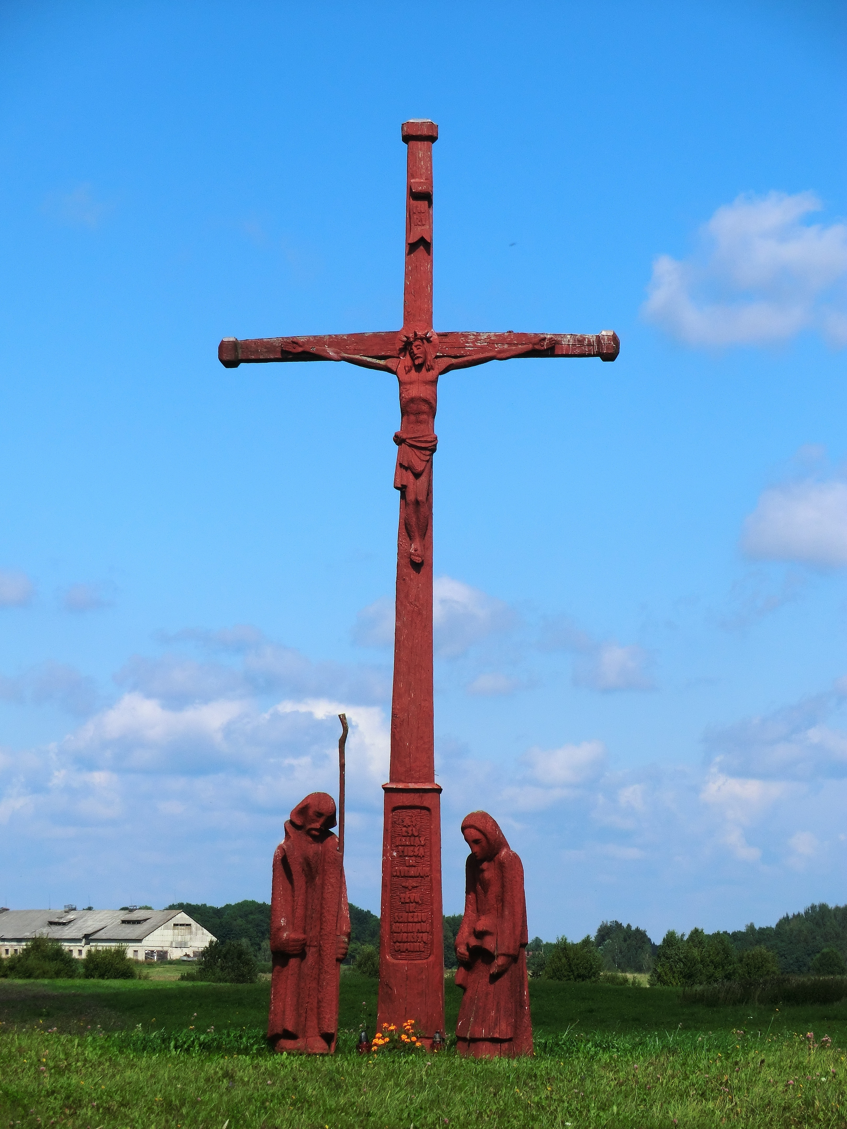 Šimonių sen., Lithuania